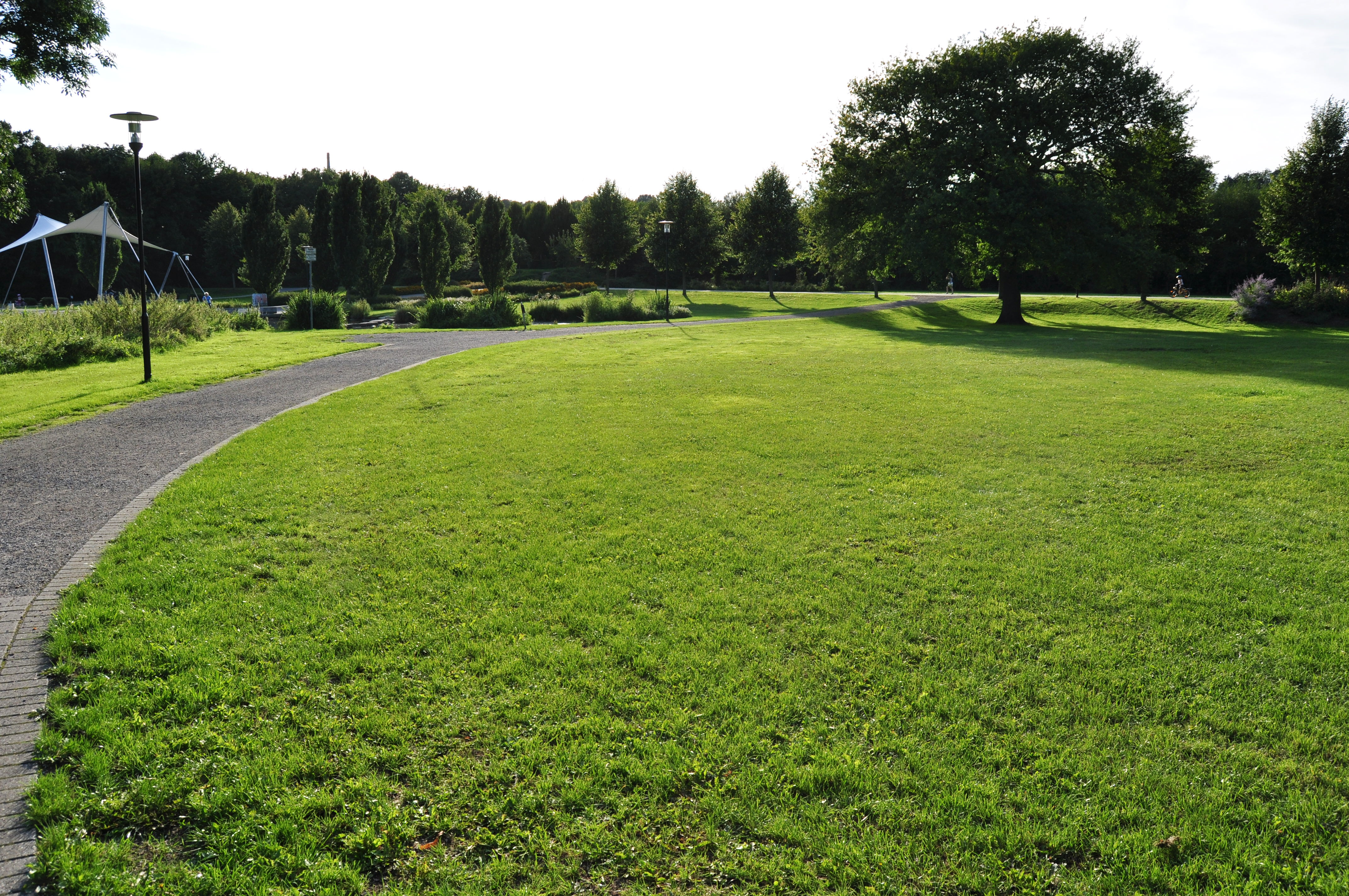 Stadtpark in Geilenkirchen, grüne Wiese